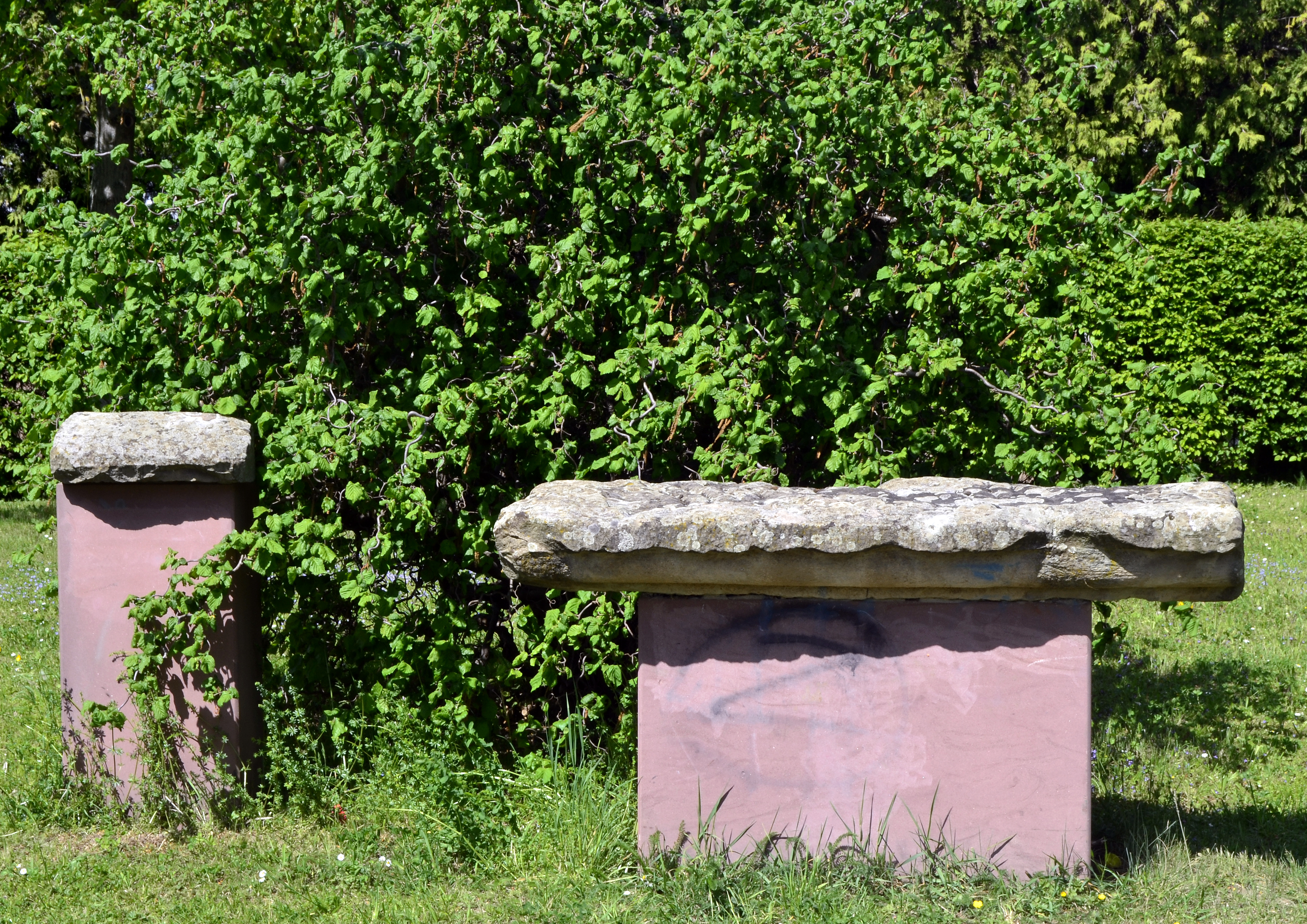 Erhaltene Originalsteine vom Nordtor des römischen Kastells Heilbronn-Böckingen